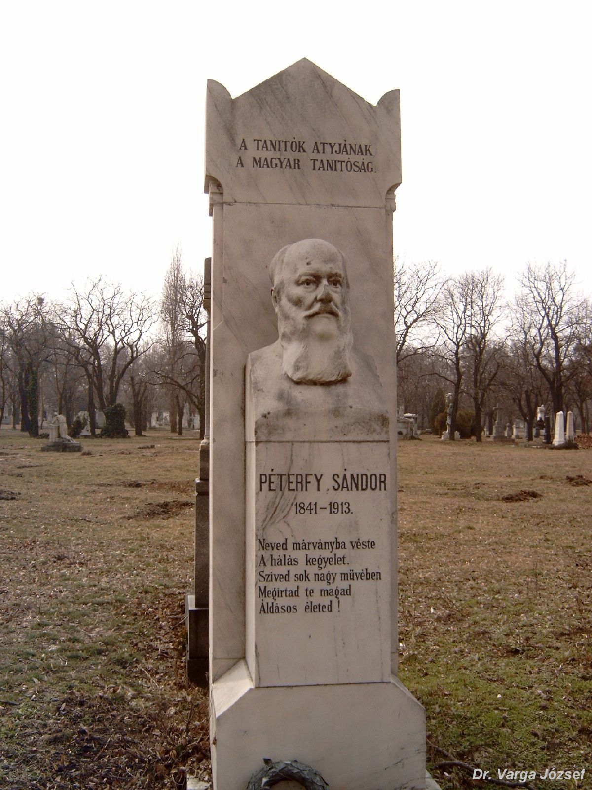 Péterfy Sándor (Nemescsó, 1841. augusztus 5. – Pándorfalu, 1913. augusztus 10.) pedagógus, tanügyi író sírja Budapesten. Kerepesi temető: 9-1-14 [szobrász: Istók János]